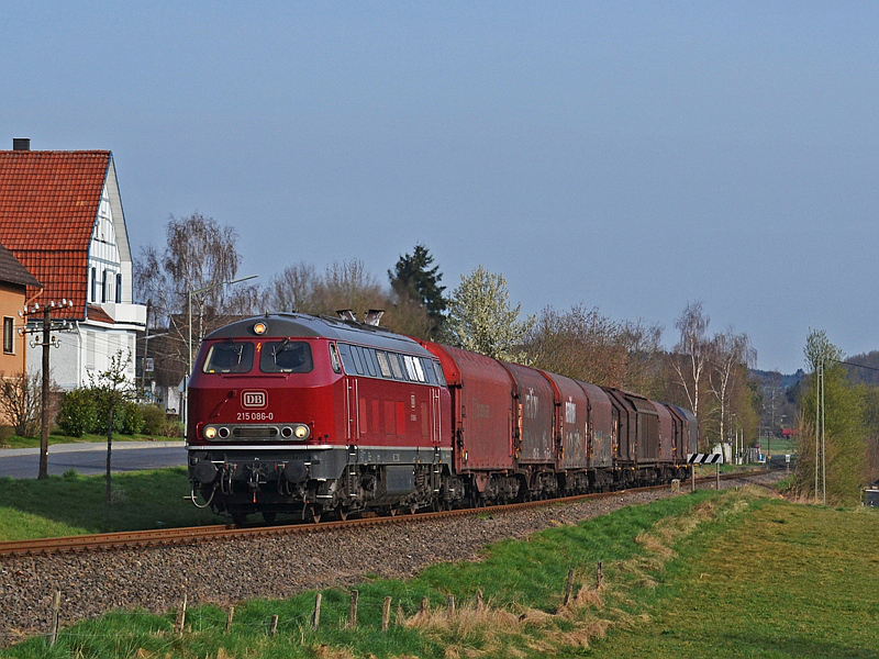 215 086-0 mit einem Nahgüterzug bei Obererbach.